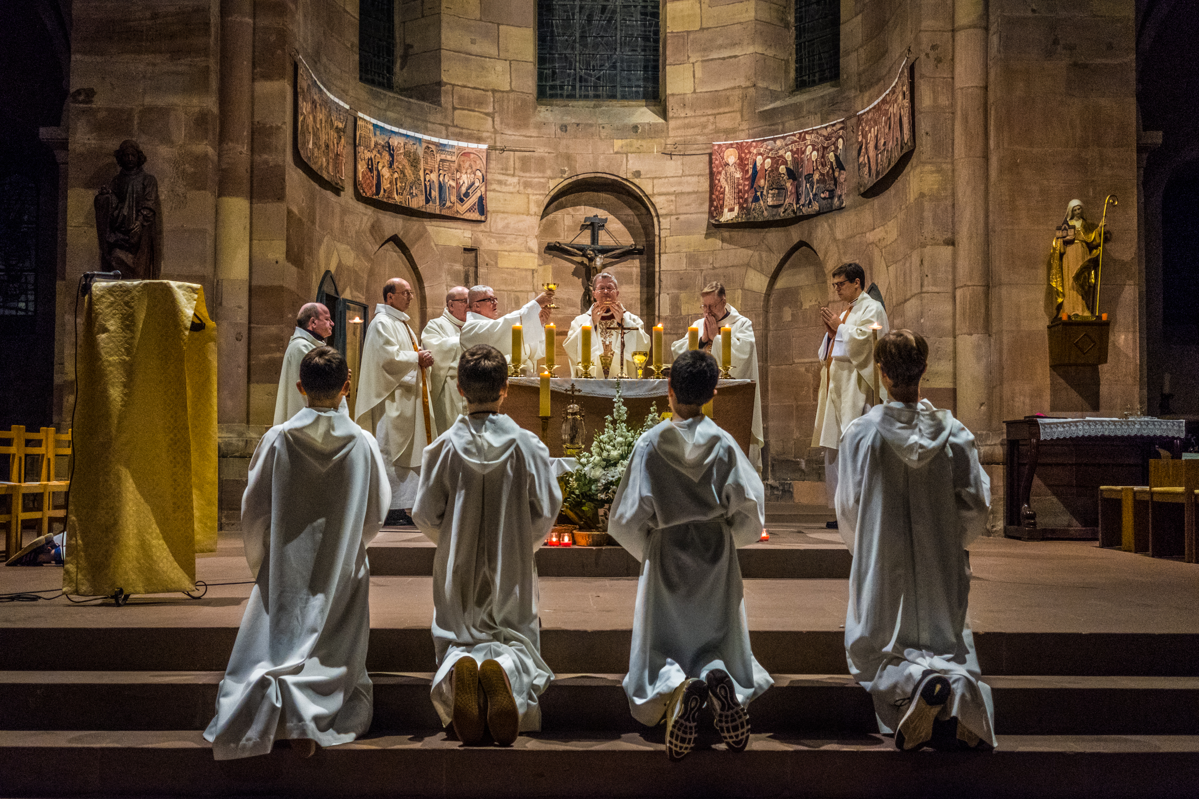 Messe à la chapelle du collège Saint-Etienne 30 novembre 2018